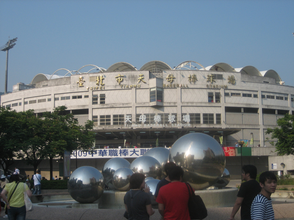 台北市立天母棒球場。